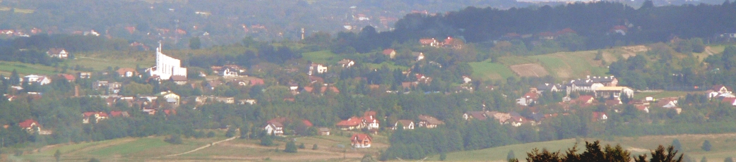 Tarnowiec. Powiat tarnowski. Małopolska. 2010.